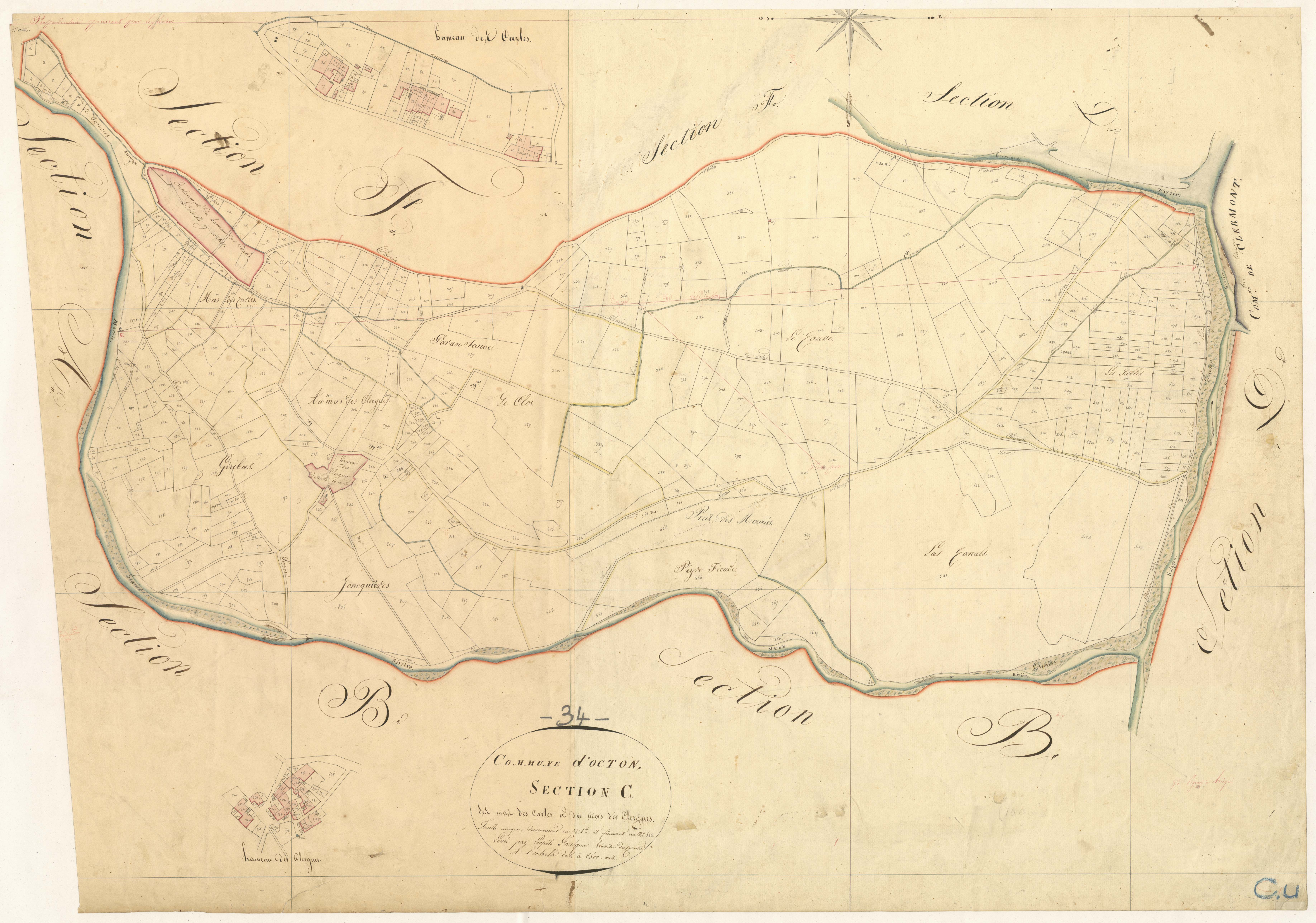 Octon. - Cadastre napoléonien : plan de la section des Carles et du Mas des Clergues.